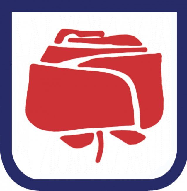 Grb Mestne občine Nova Gorica je stilizirana rdeča vrtnica na belem polju, ki je obrobljeno z modrim robom. Rob je kvadratne oblike in ima spodnja vogala zaobljena.